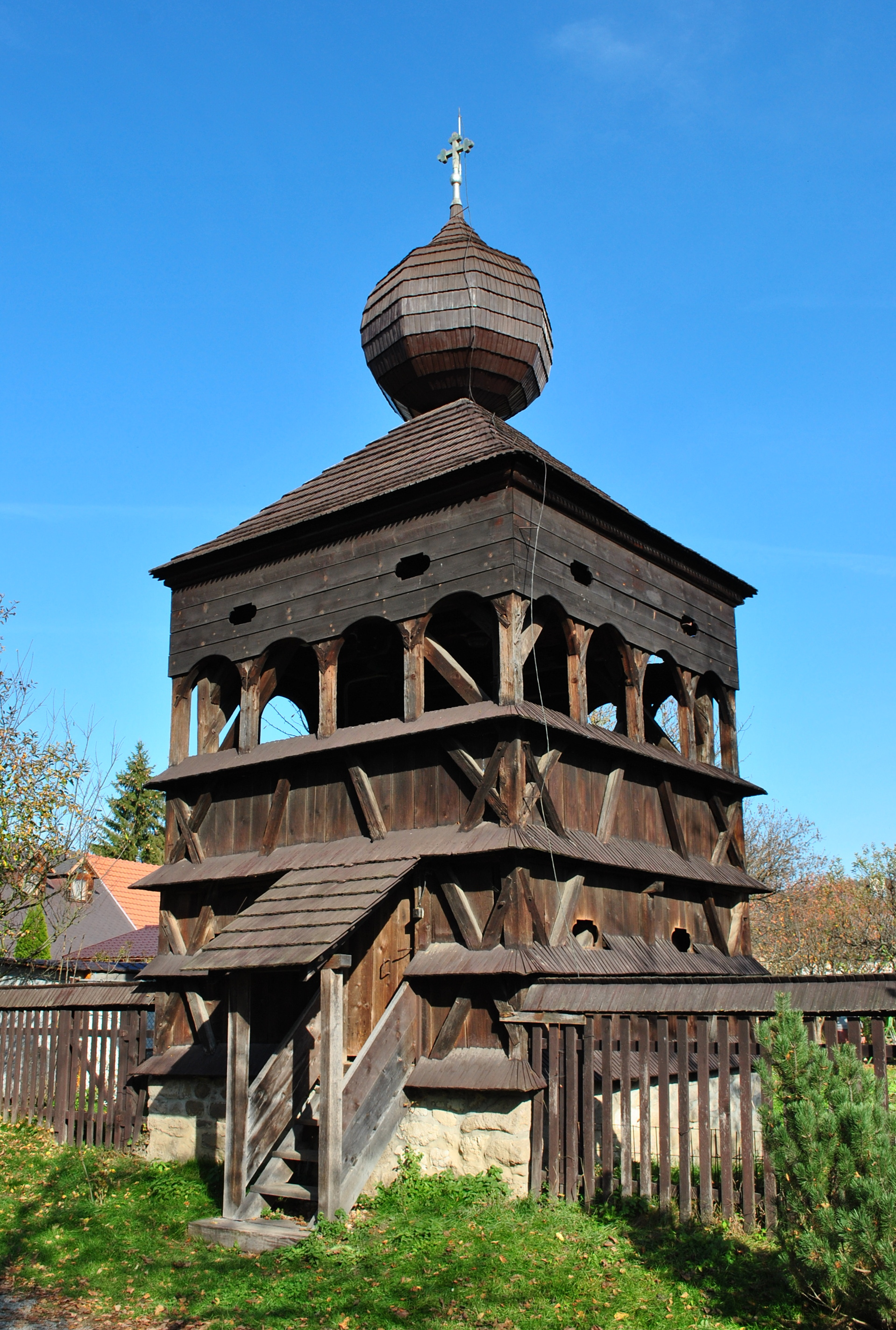 Zvonica drevená